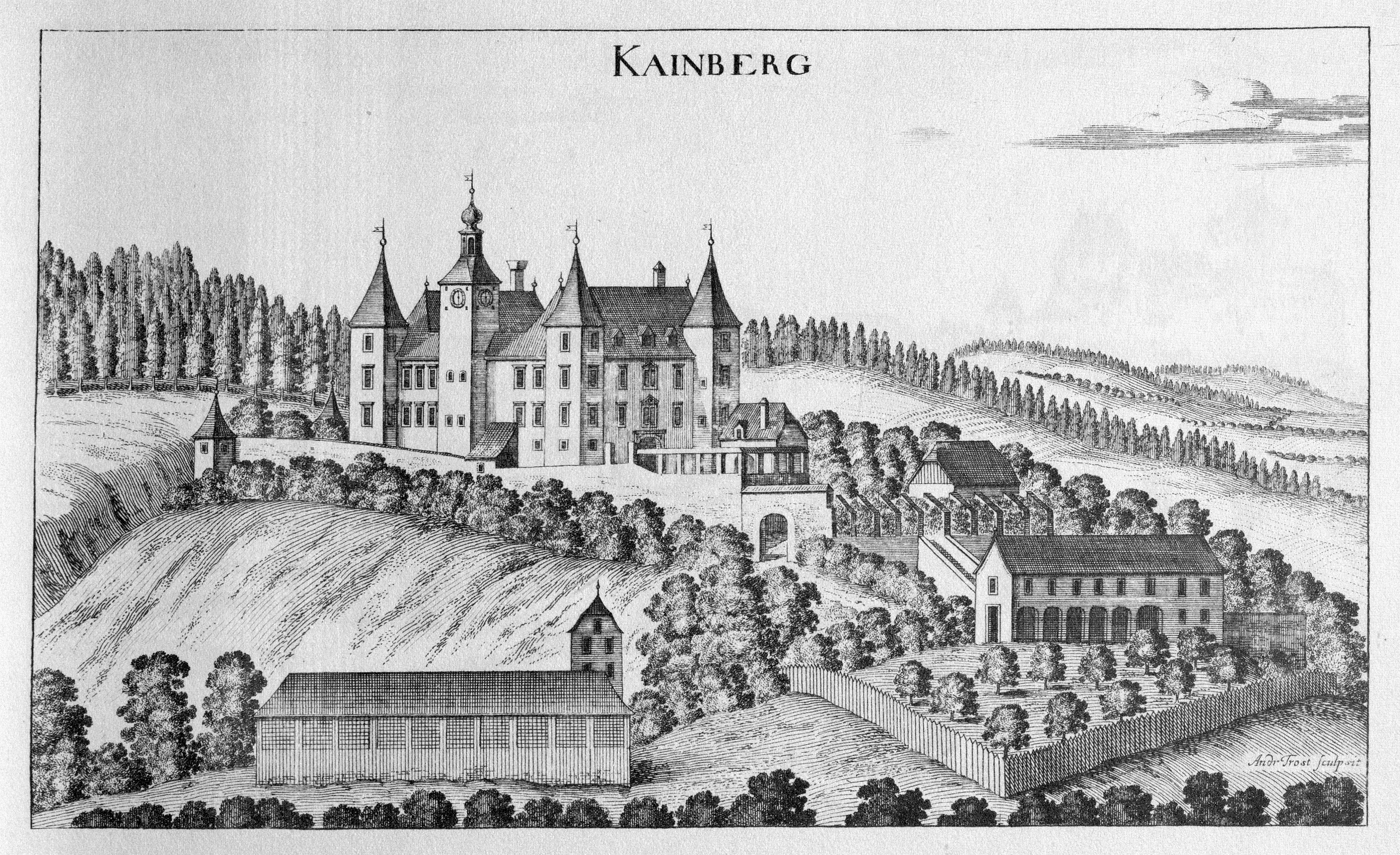 G. M. Vischers Käyserlichen Geographi, Topographia Ducatus Stiriae, Das ist: Eigentliche Delineation / und Abbildung aller Städte / Schlösser / Marcktfleck / Lustgärten / Probsteyen / Stiffter / Clöster und Kirchen / so es sich im Herzogthumb Steyrmarck befinden; Und anjetzo Umb einen billichen Preyß zu finden seynd Bey Johann Bitsch Universitäts Buchhandlern / Auff dem Juden=Platz bey der guldenen Saulen. Graz 1681 Die Nummerierung der Dateien folgt der alphabetischen Reihung der Ortsnamen